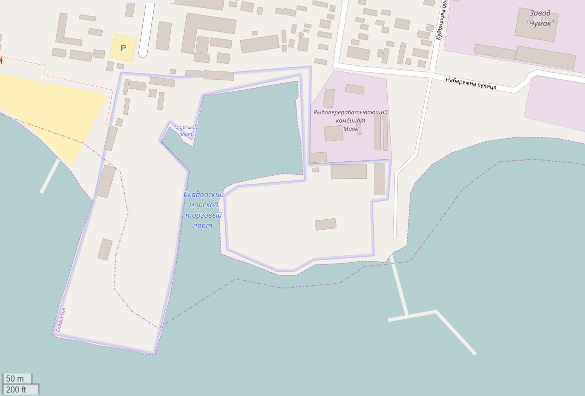 Карта-схема території Скадовського морського торговельного порту. Скадовськ, Херсонська область, Україна. На основі OpenStreetMap